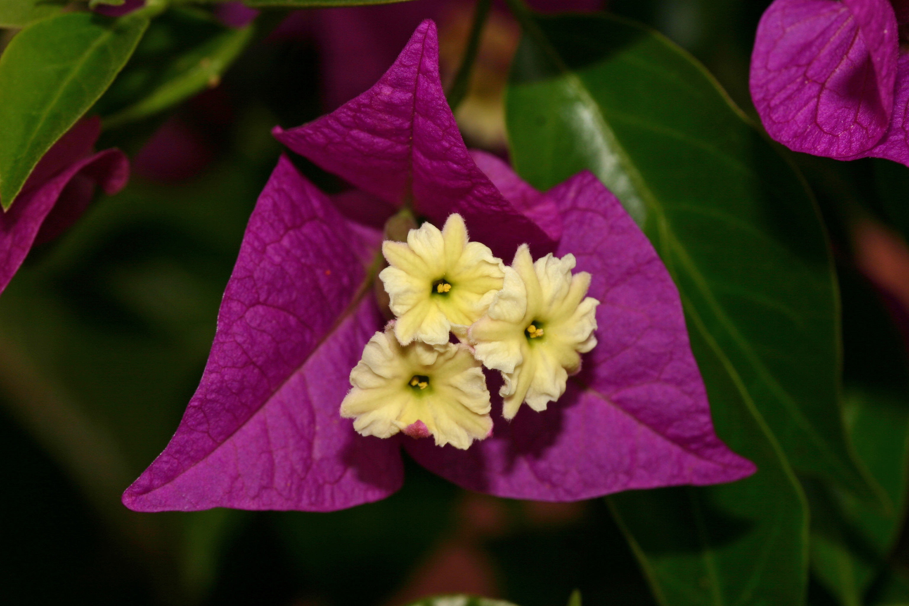 Bougainvilleablüte